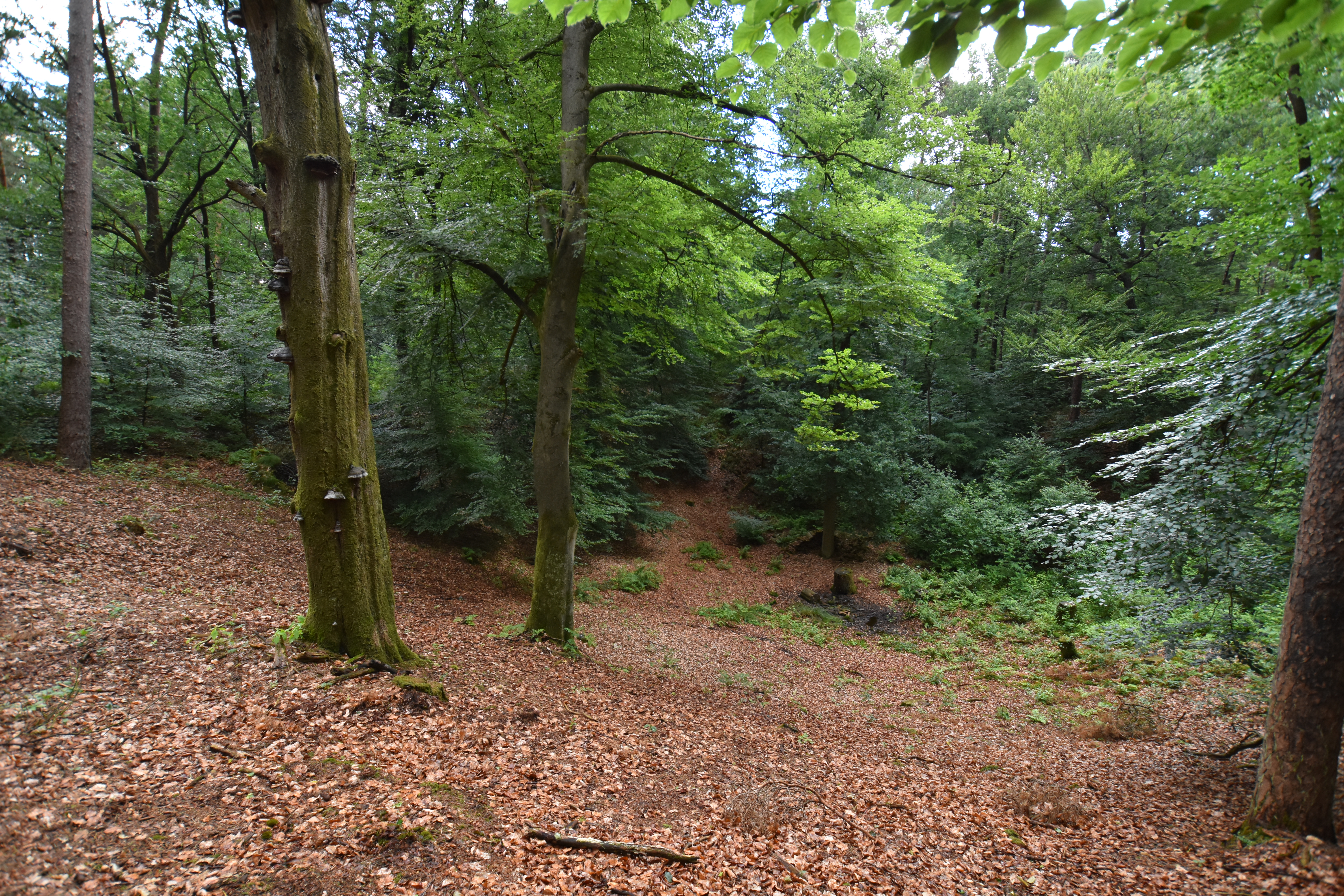 Das Toteisloch Alkenkuhle im Wald zwischen Alfhausen und Ankum.